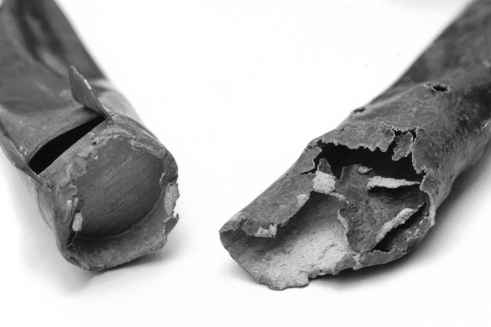 Orgelpfeife mit Bleikorrosion ("Bleifraß") aus der Orgel der Kilianikirche in Höxter (Foto von 1999)